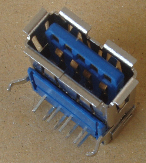 USB 3.0 A-Plug, Female